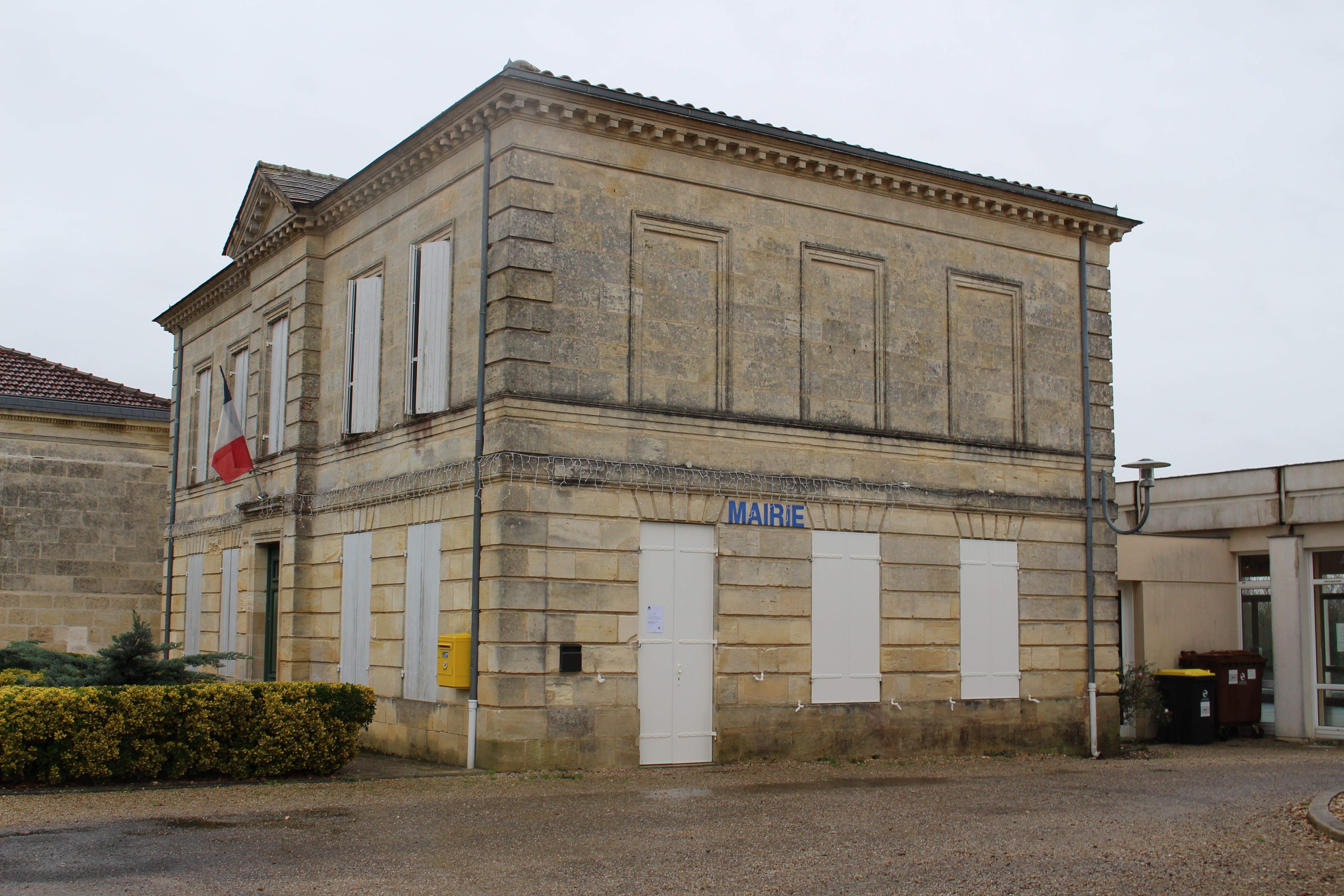 Saint-Seurin-de-Bourg , Gironde